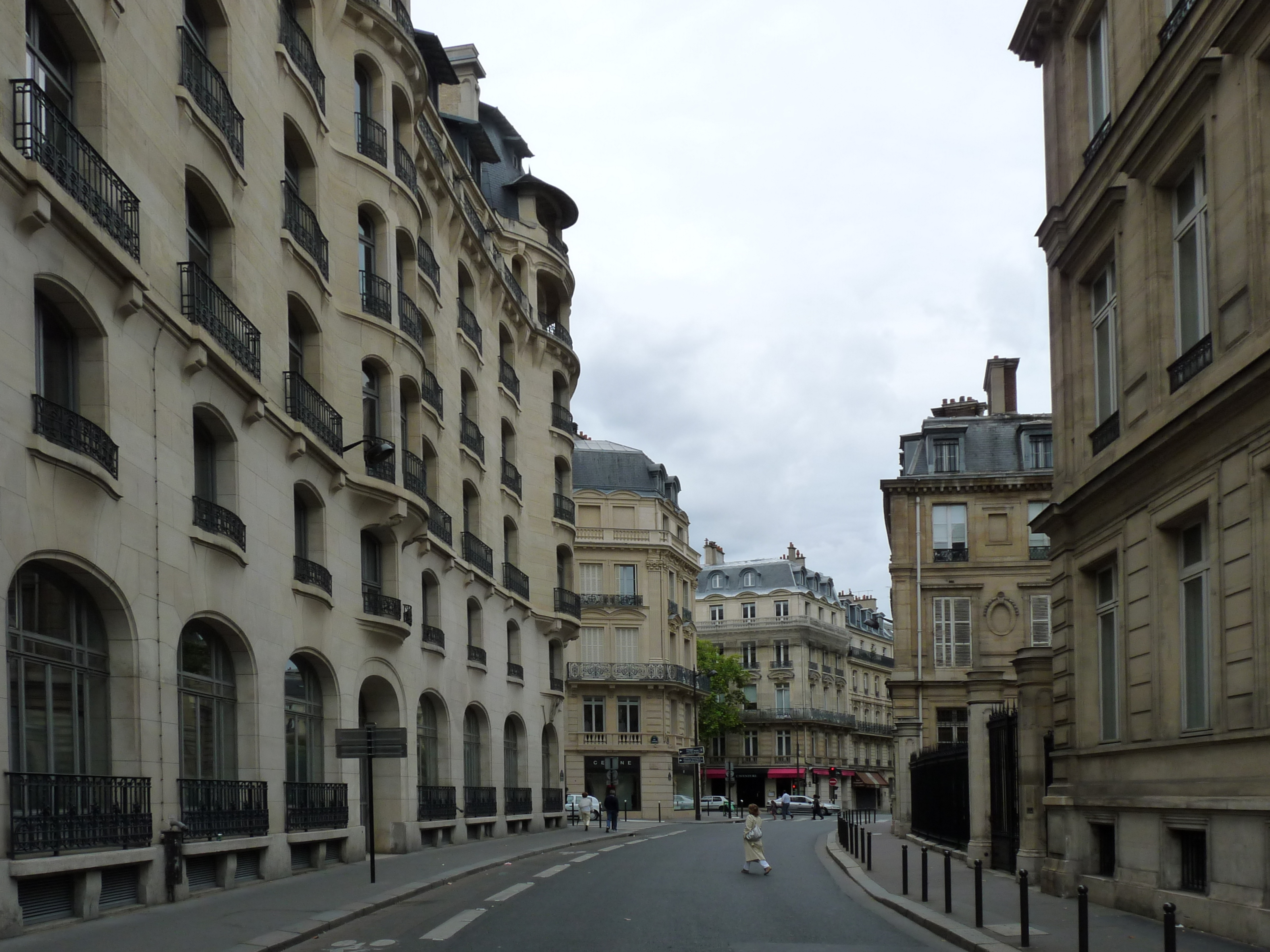 La rue de Presbourg à Paris, vue de l'avenue Kleber